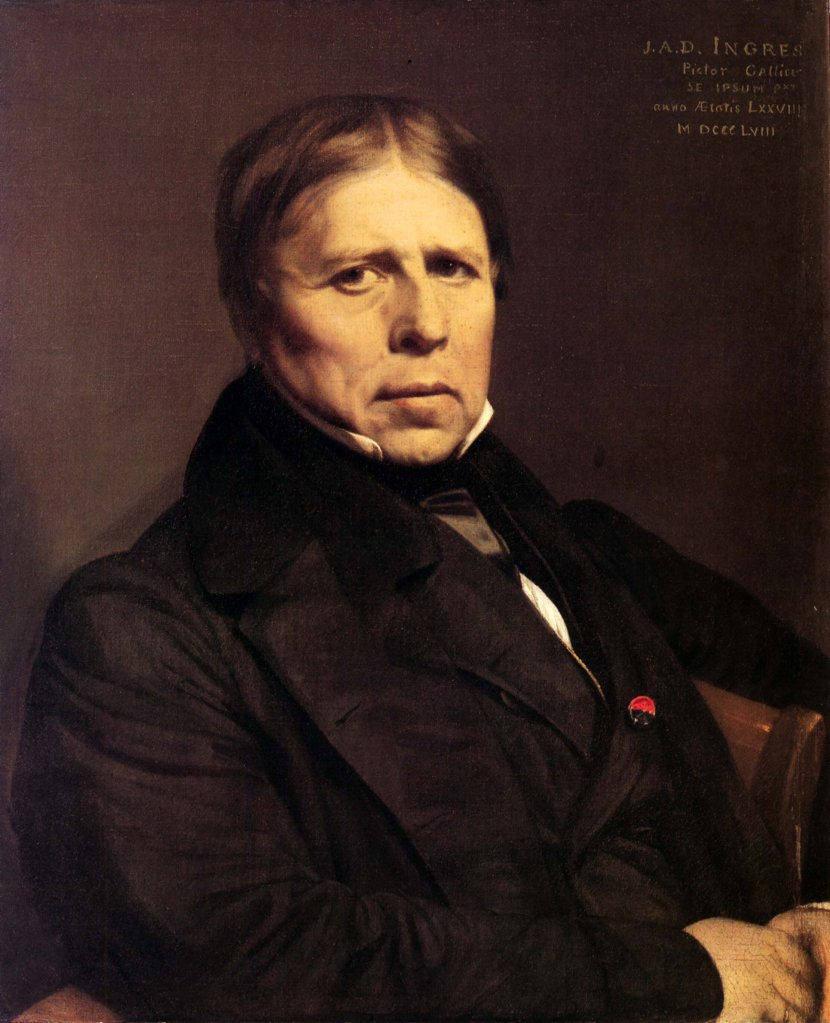 Ingres autoportrait à 78 ans galerie des Offices Florence